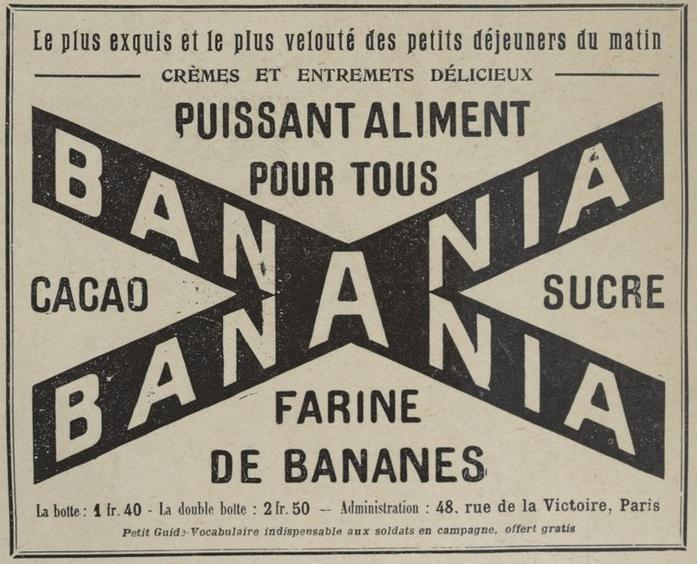 Encart publicitaire pour Banania dans Lectures pour tous du 15 mars 1915, page du sommaire.